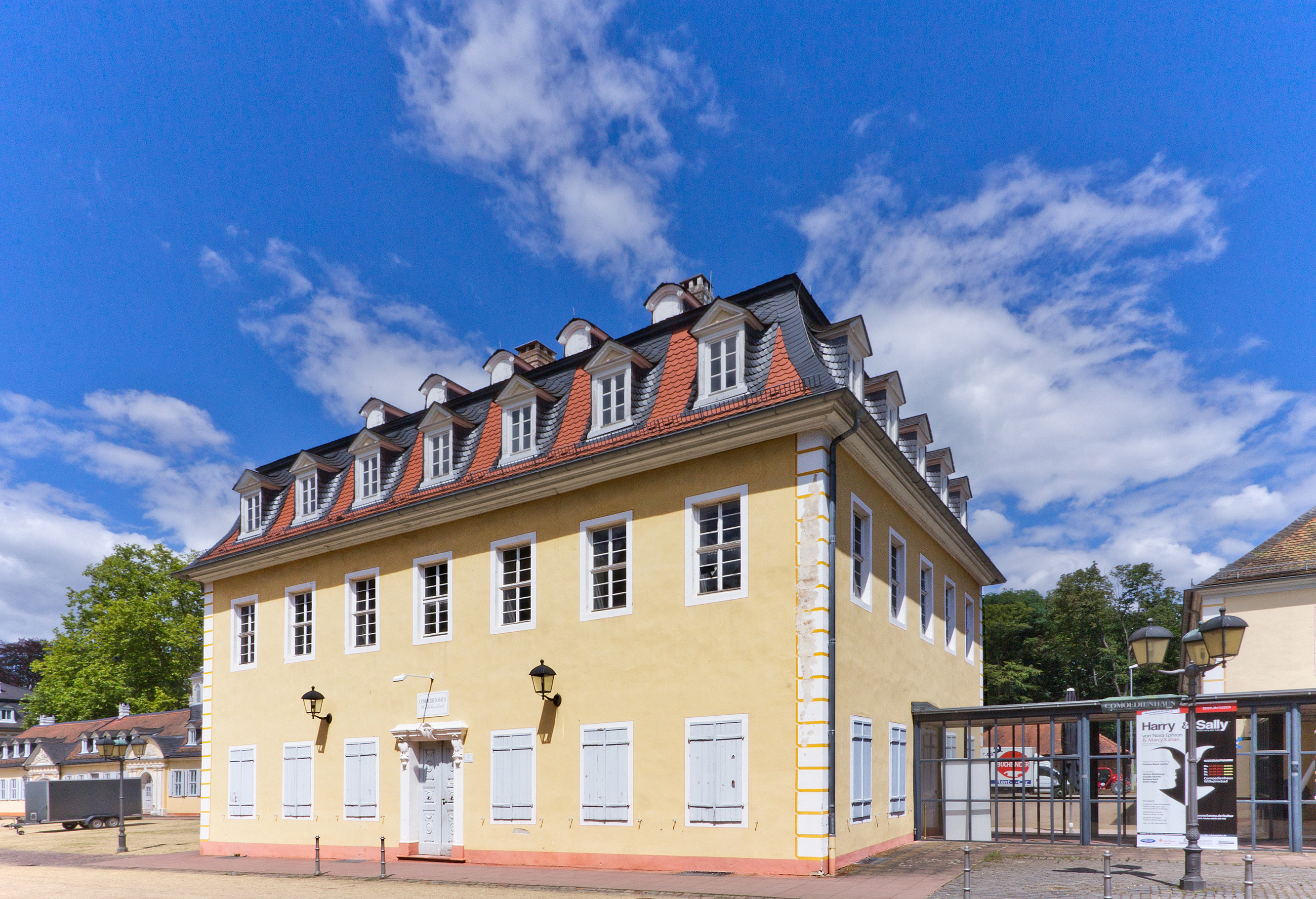 1781 für Wilhelm von Hessen-Kassel errichtetes Comoedienhaus, Bestandteil der Parkanlage Wilhelmsbad in Hanau. Eines der wenigen historischen Theater in Deutschland, in dem barocke Bühnenmaschinerie und historische Bühnenbilder erhalten sind.